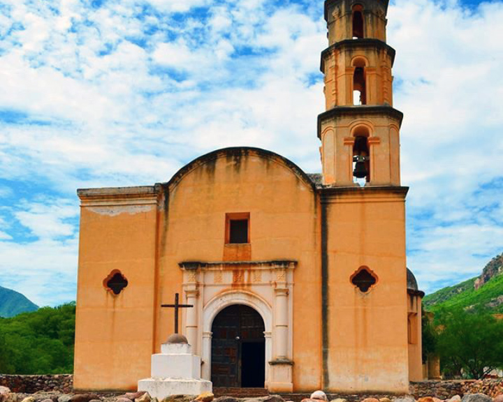 Templo del Santo Ángel en Satevó de gran belleza colonial, siglo XVII.